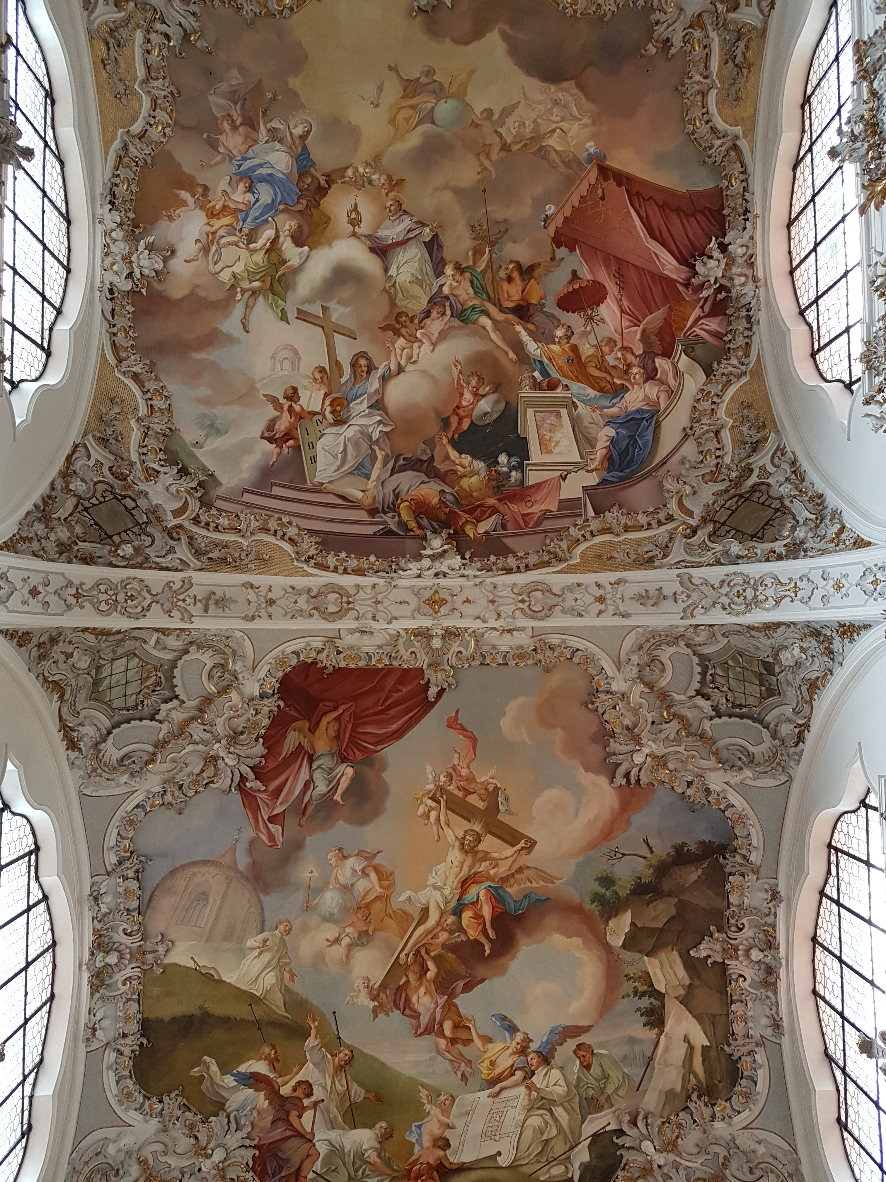 Stiftskirche St. Johannes d. T. (Steingaden), vorderes und mittleres Fresko